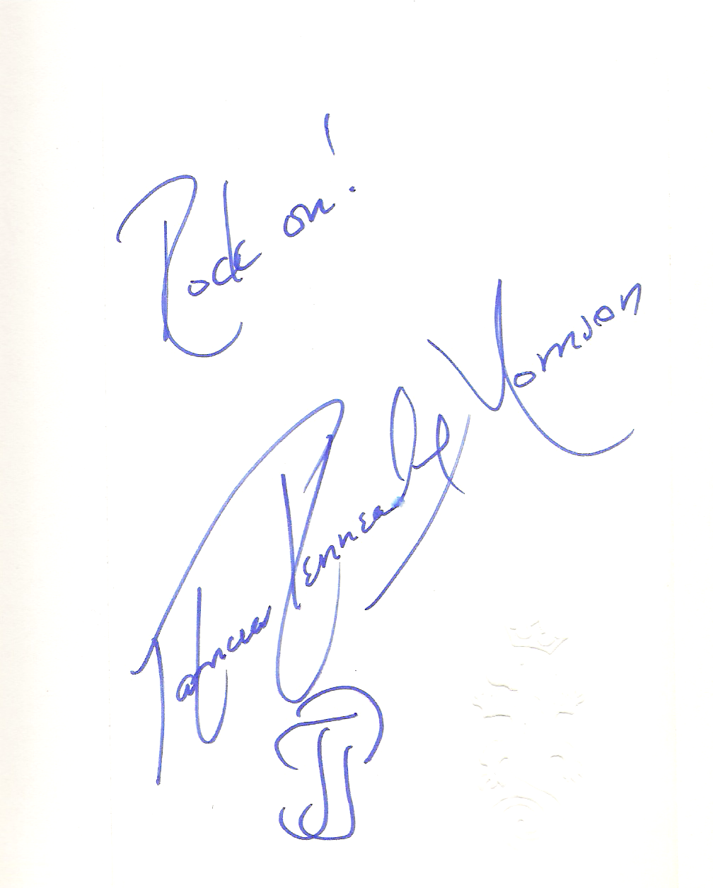 Autogramm von Patricia Kennealy-Morrison, Privatbesitz, selbst eingescannt.